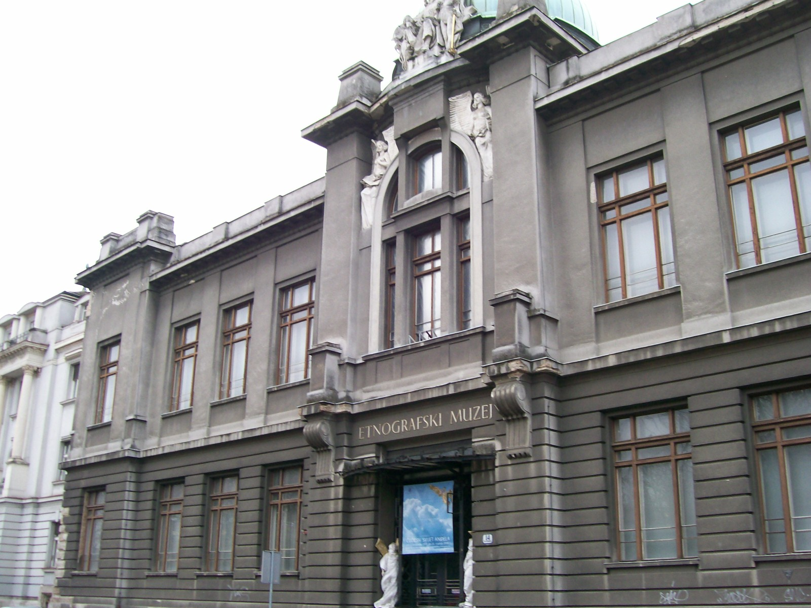 Etnografski muzej Zagreb